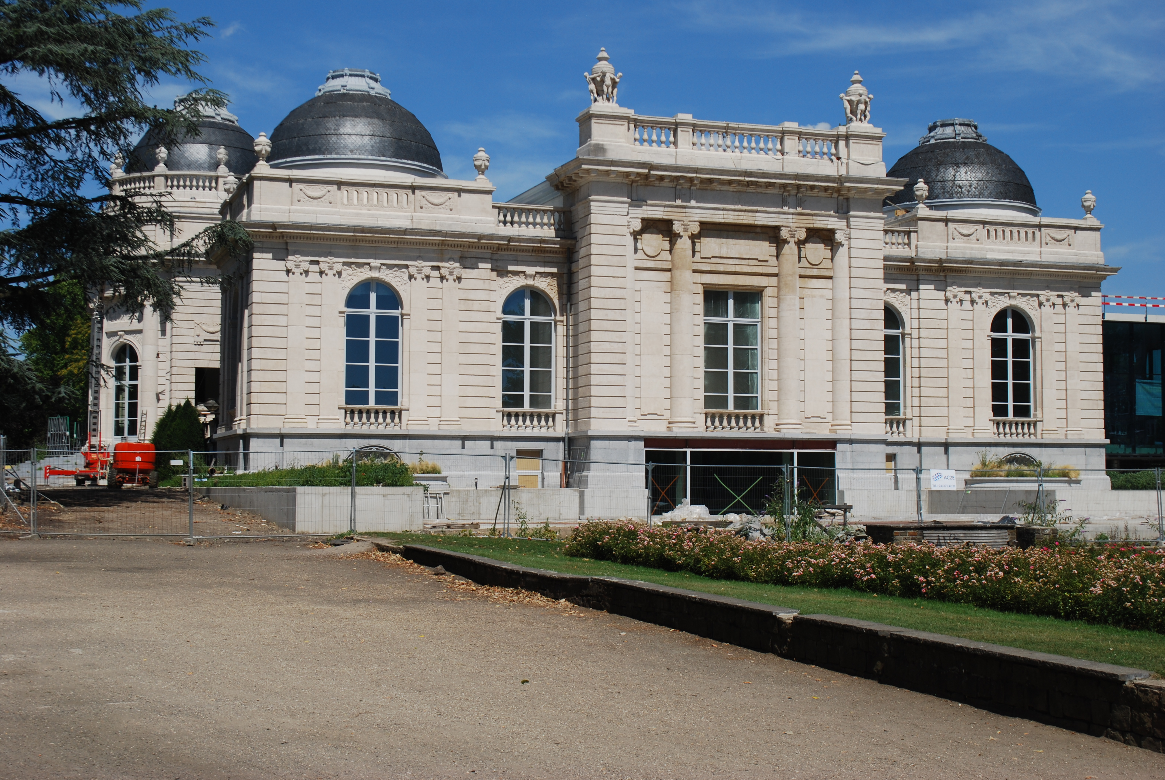 Vue de Liège.